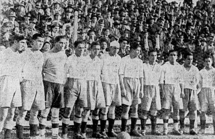 Magallanes antes de un partido contra un combinado de La Calera el 15 de julio de 1934